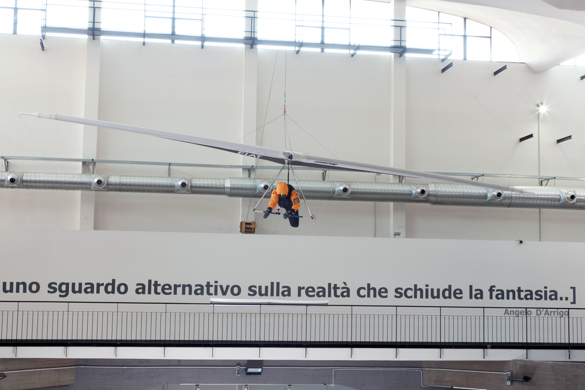 Deltaplano ad ala rigida Icaro Stratos esposto al Museo nazionale della scienza e della tecnologia Leonardo da Vinci di Milano.